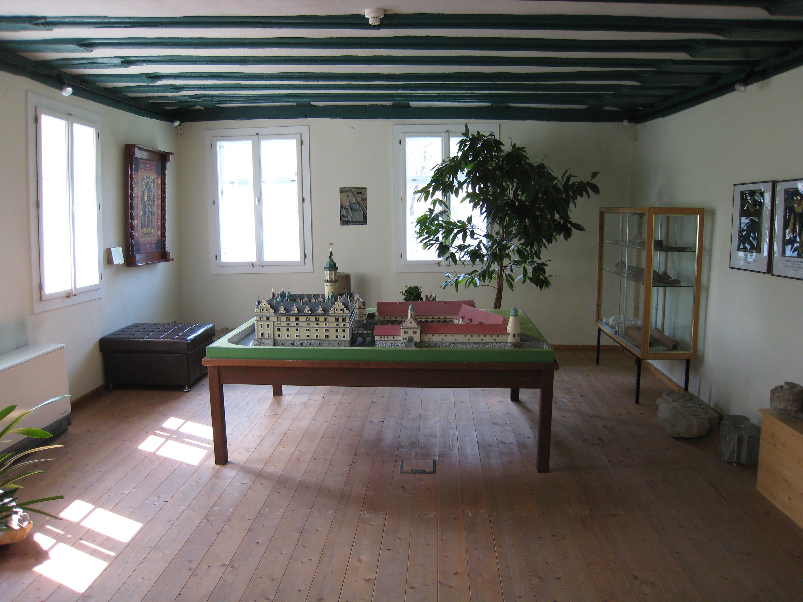 Dauerausstellung im Gärtnerhaus in Arnstadt